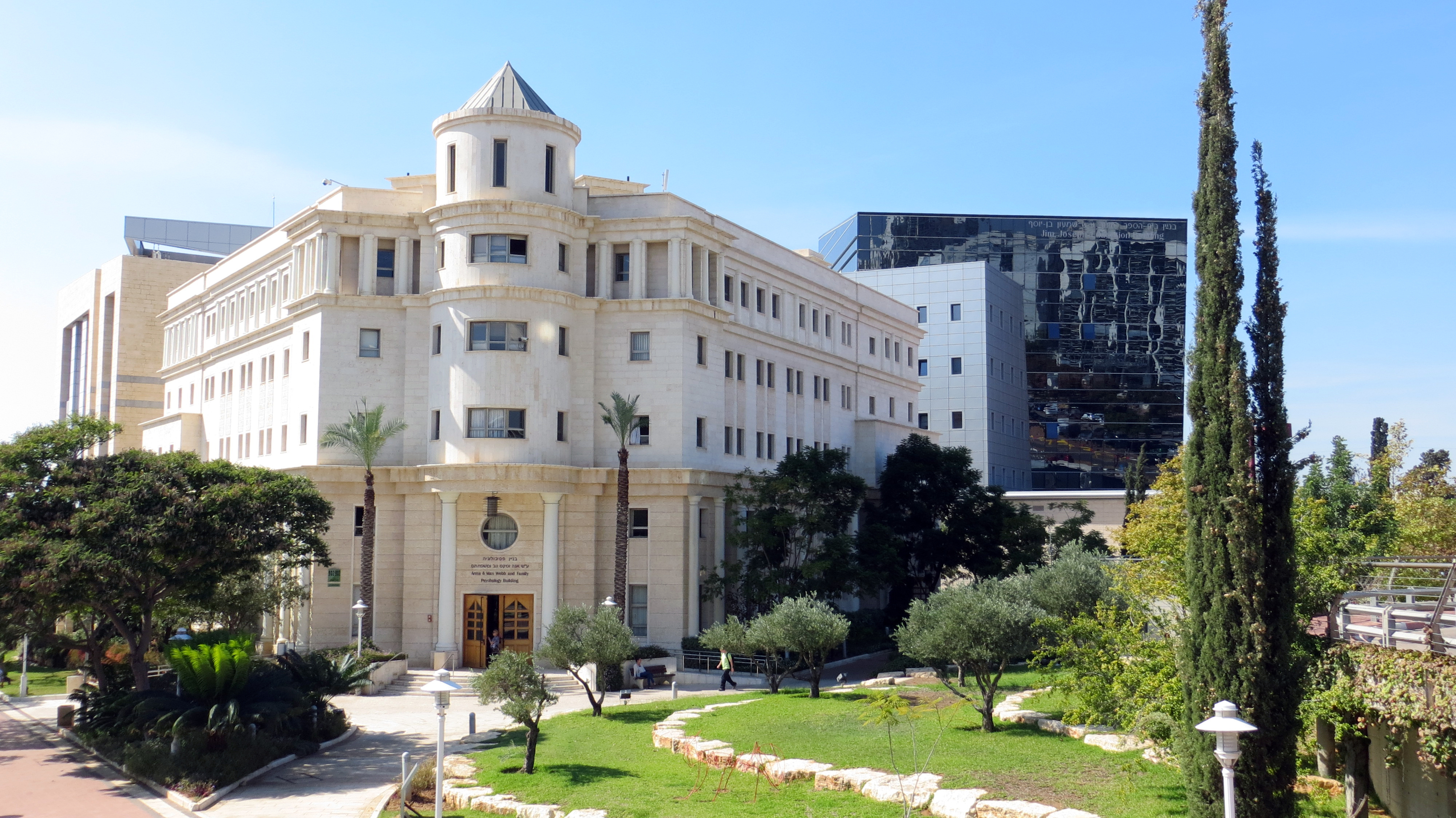 902 בנין פסיכולוגיה ע"ש אנה ומקס ווב ומשפחתם